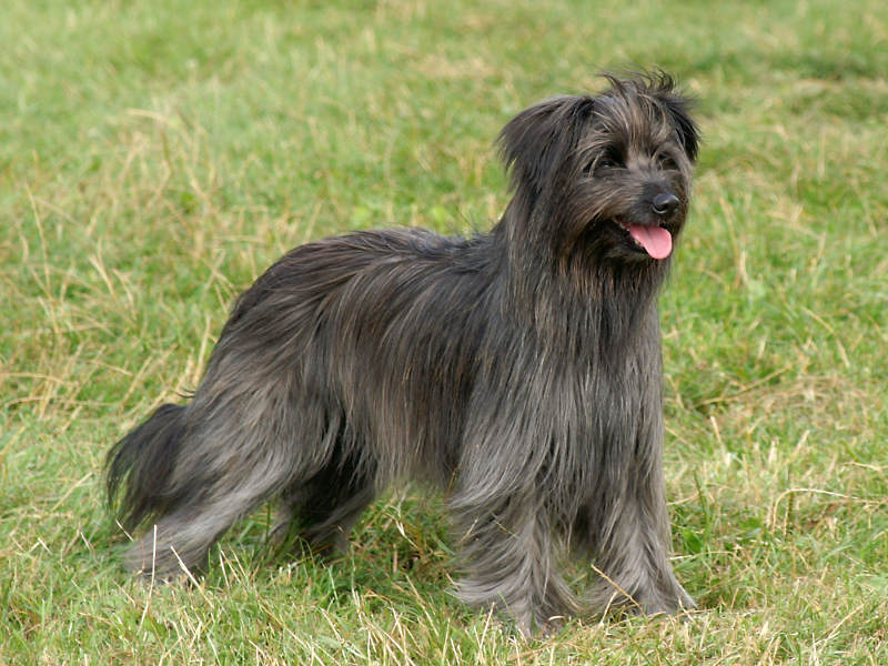 Berger des Pyrénées: Aurore vom Bassenbrink Foto selbst erstellt